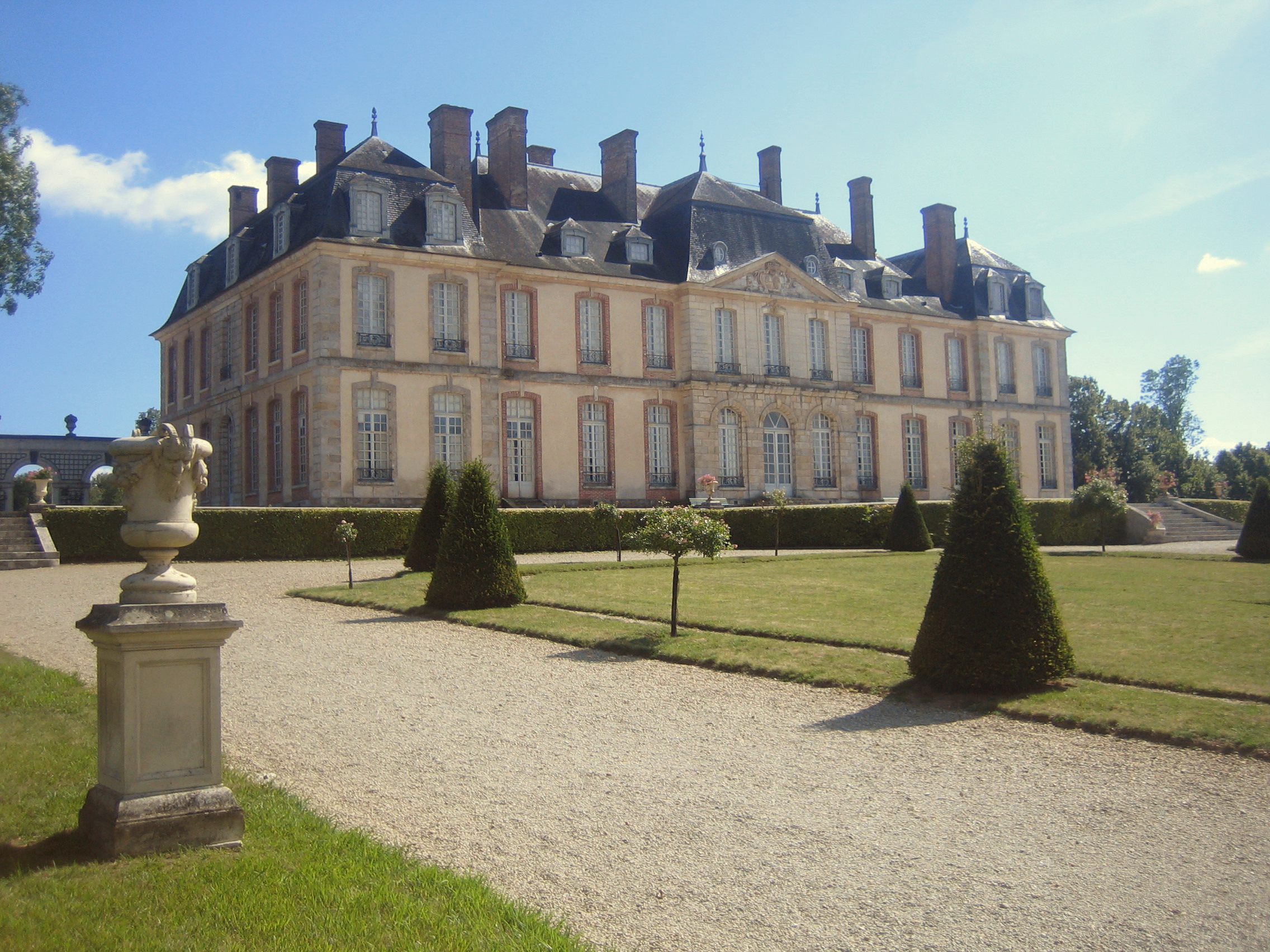 Château de La Motte-Tilly — façade Nord, avec Jardin.